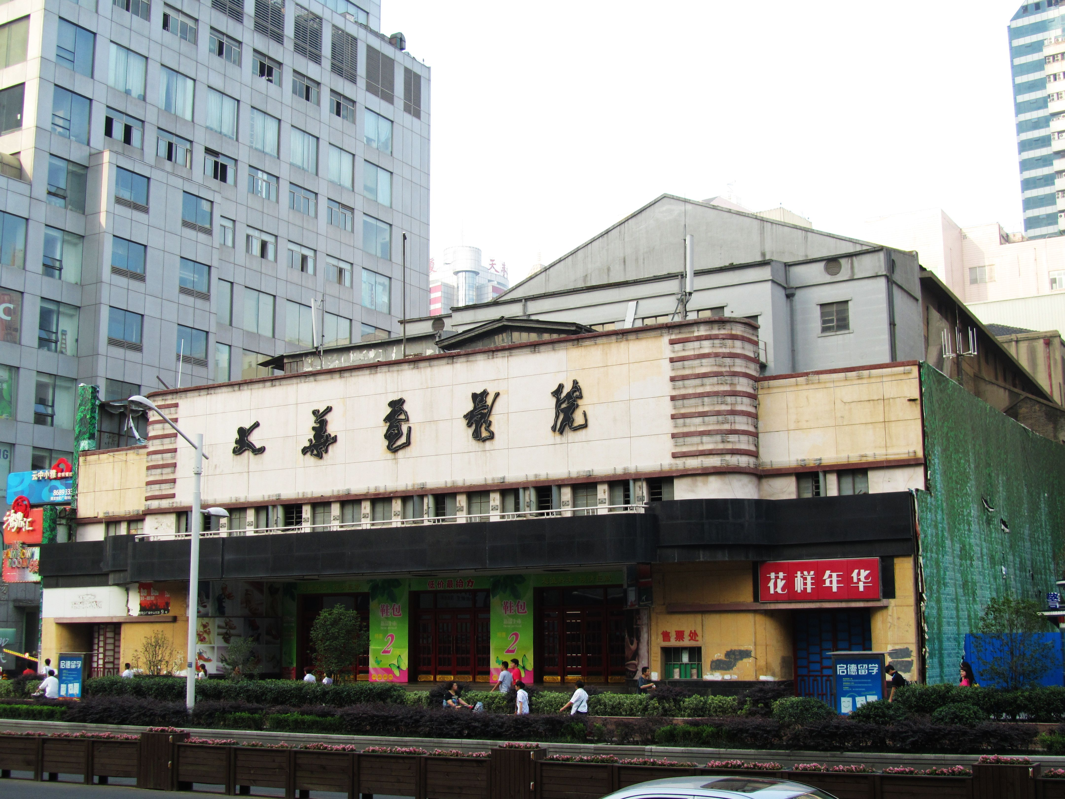 南京大华大戏院旧址。